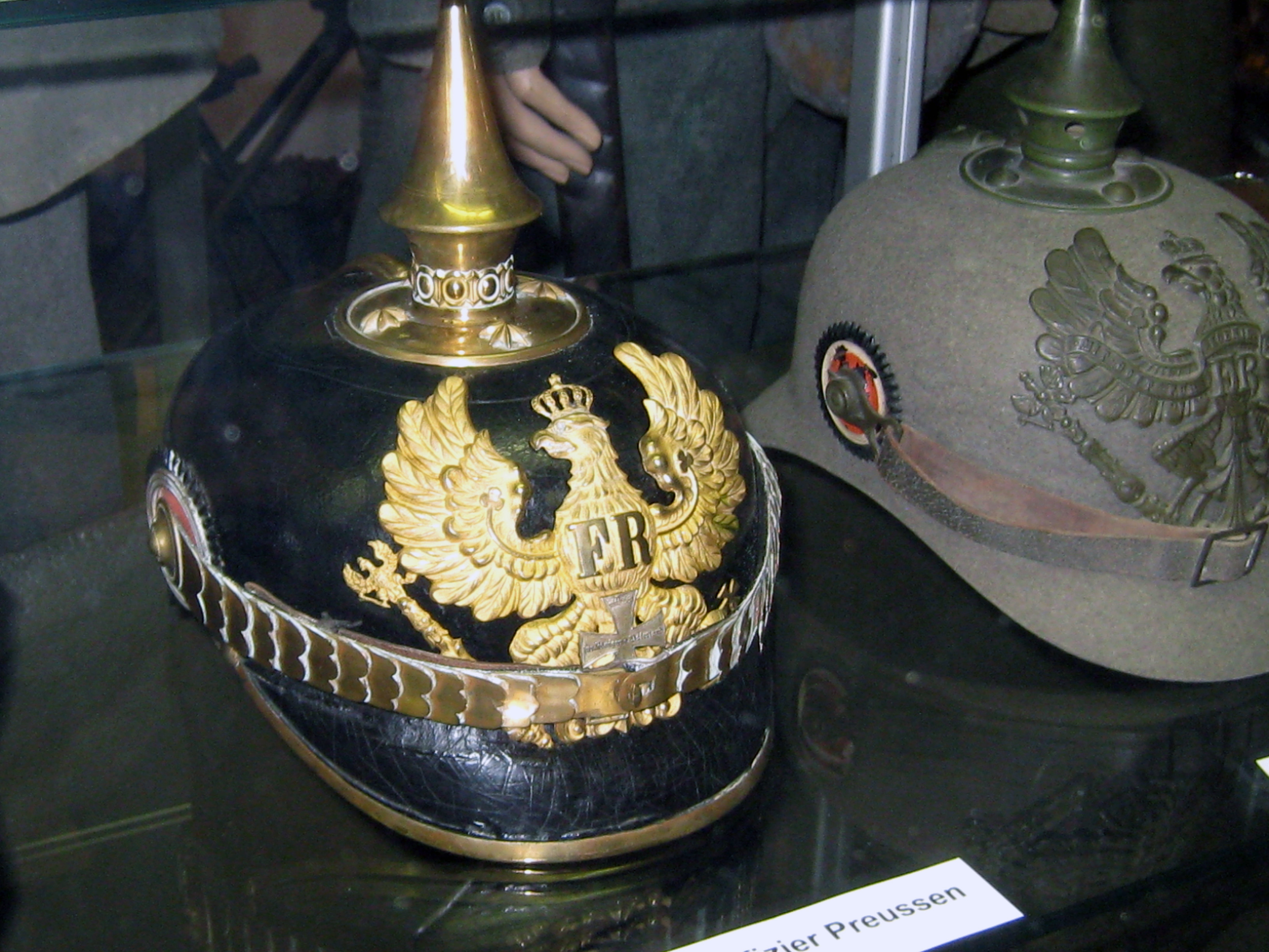 preussische Pickelhauben im Festungsmuseum Reuenthal